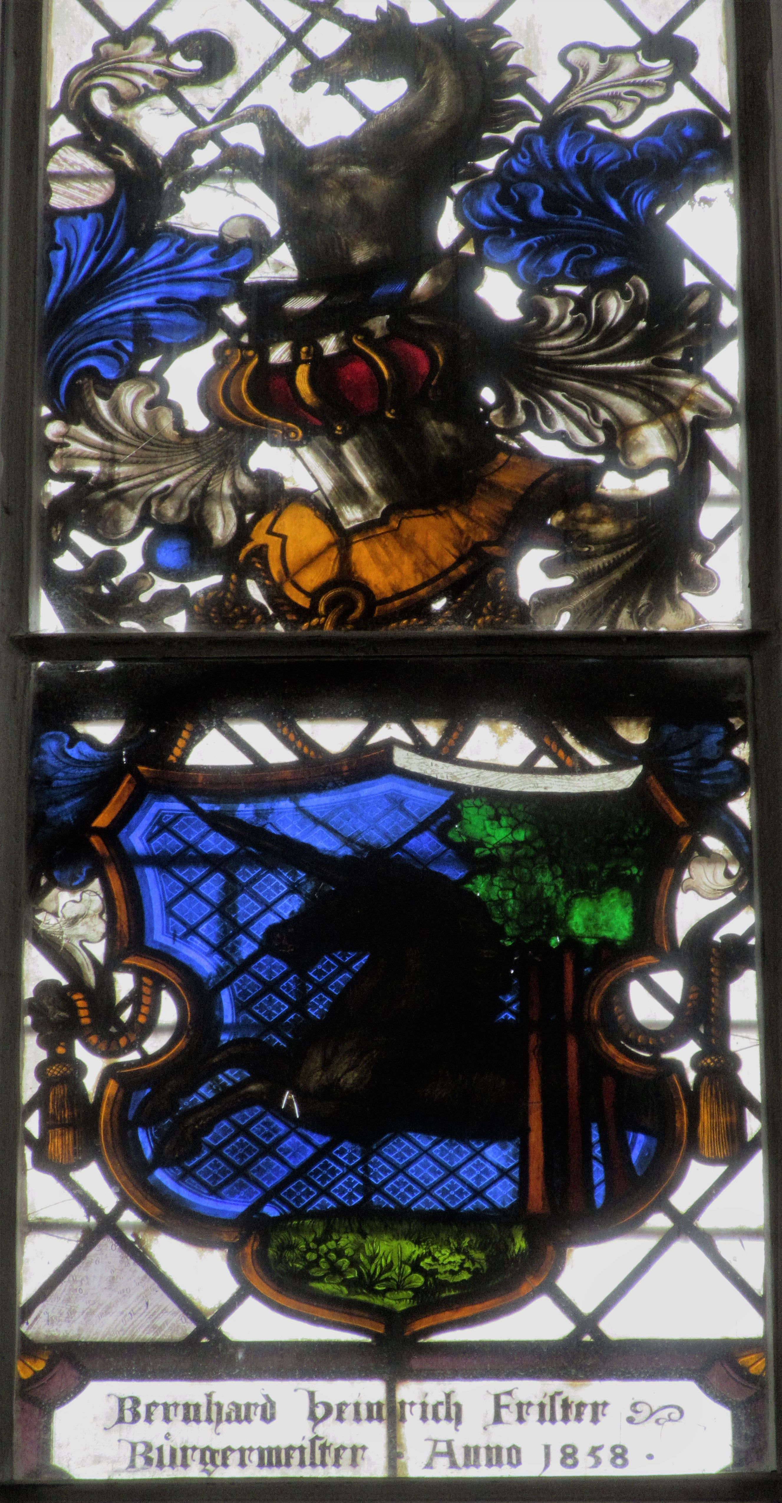 Lübeck, Jakobikirche Wappenscheibe Bernhard Heinrich Frister